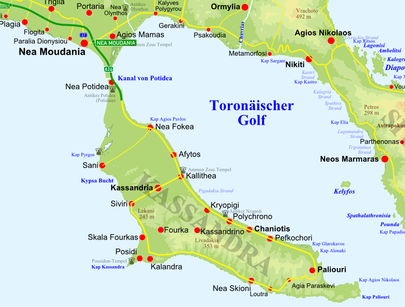 Topographische Karte der Halbinsel Kassandra